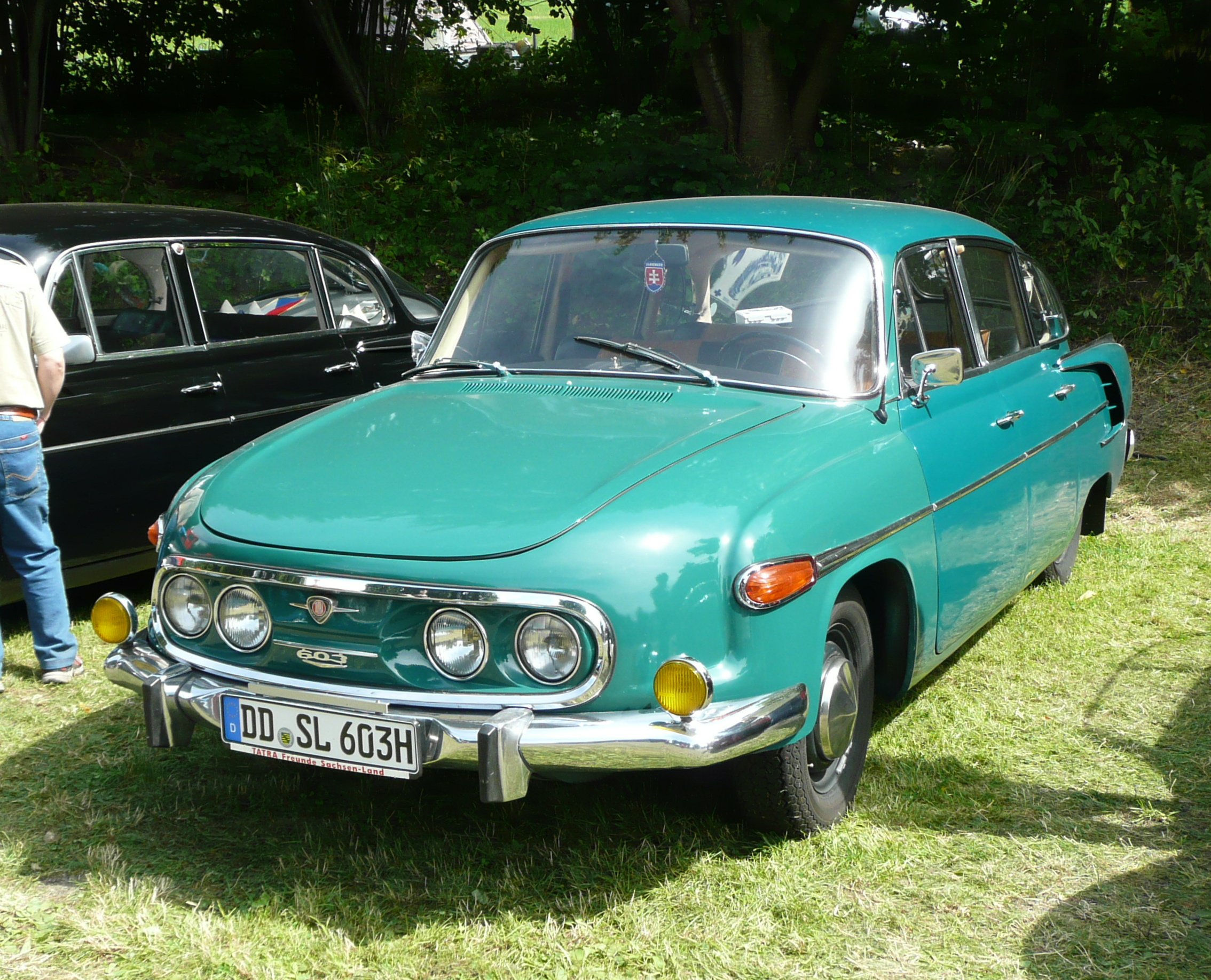 Tatra 603 mit Dresdner Kennzeichen auf der Ausstellung 125 Jahre Zittauer Schmalspurbahnen